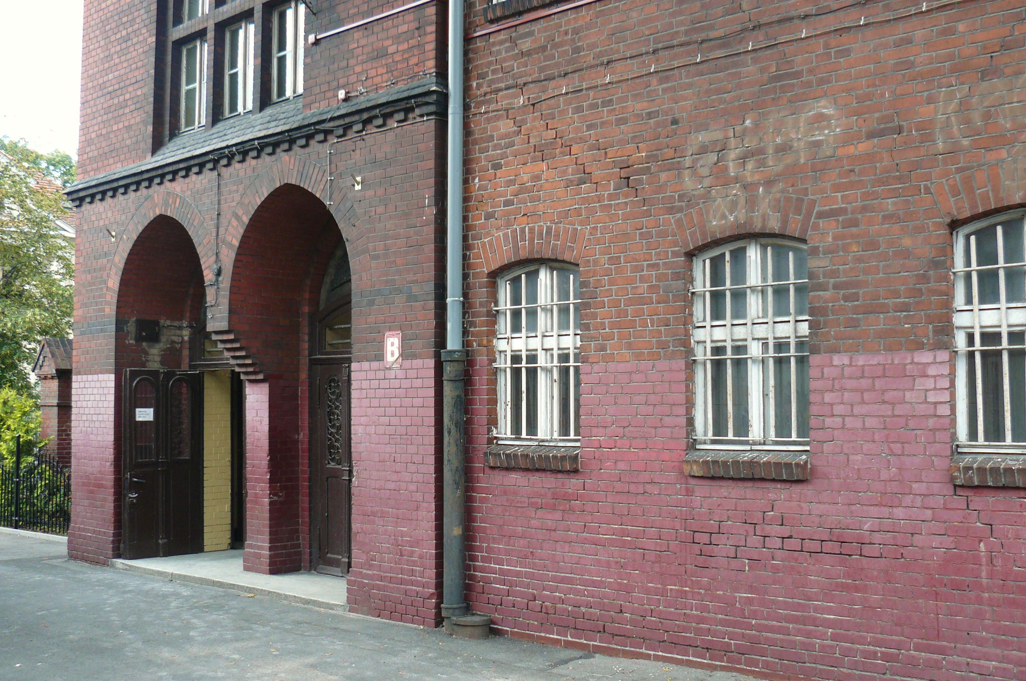 Szkołą przy ul. Słowackiego 54/60 w Poznaniu.